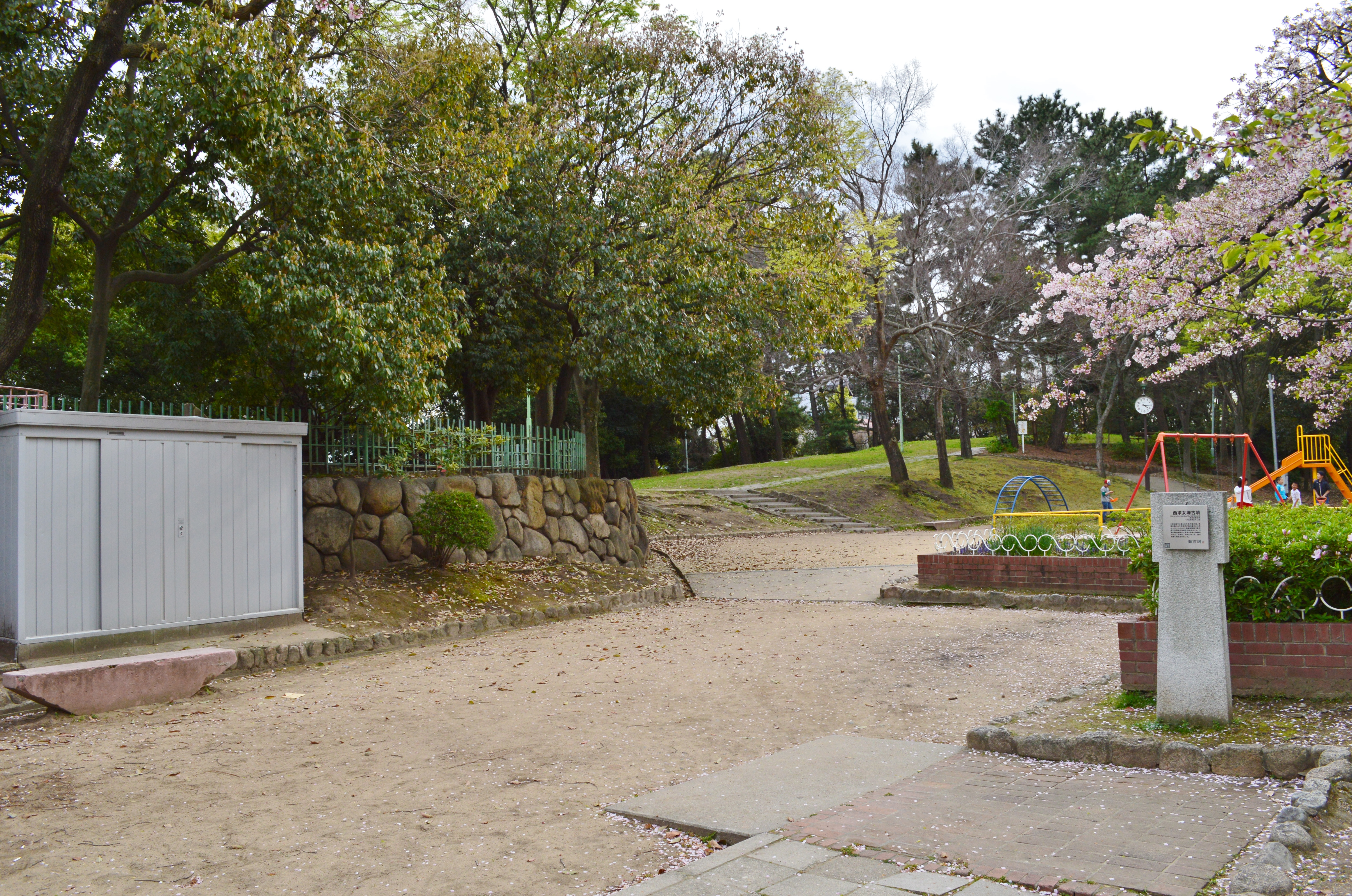 西求女塚古墳 墳丘全景